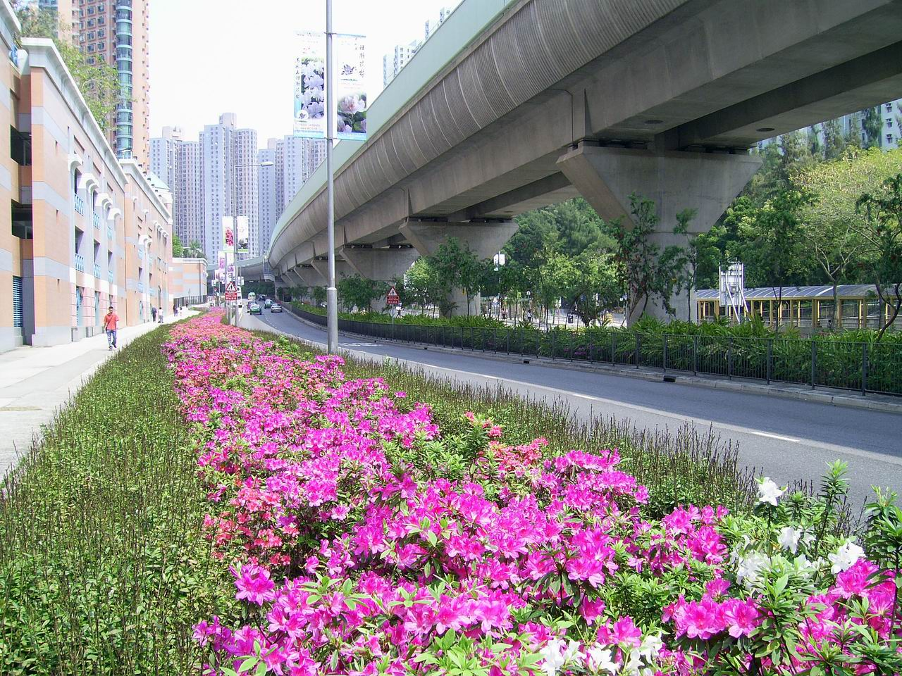 西沙路